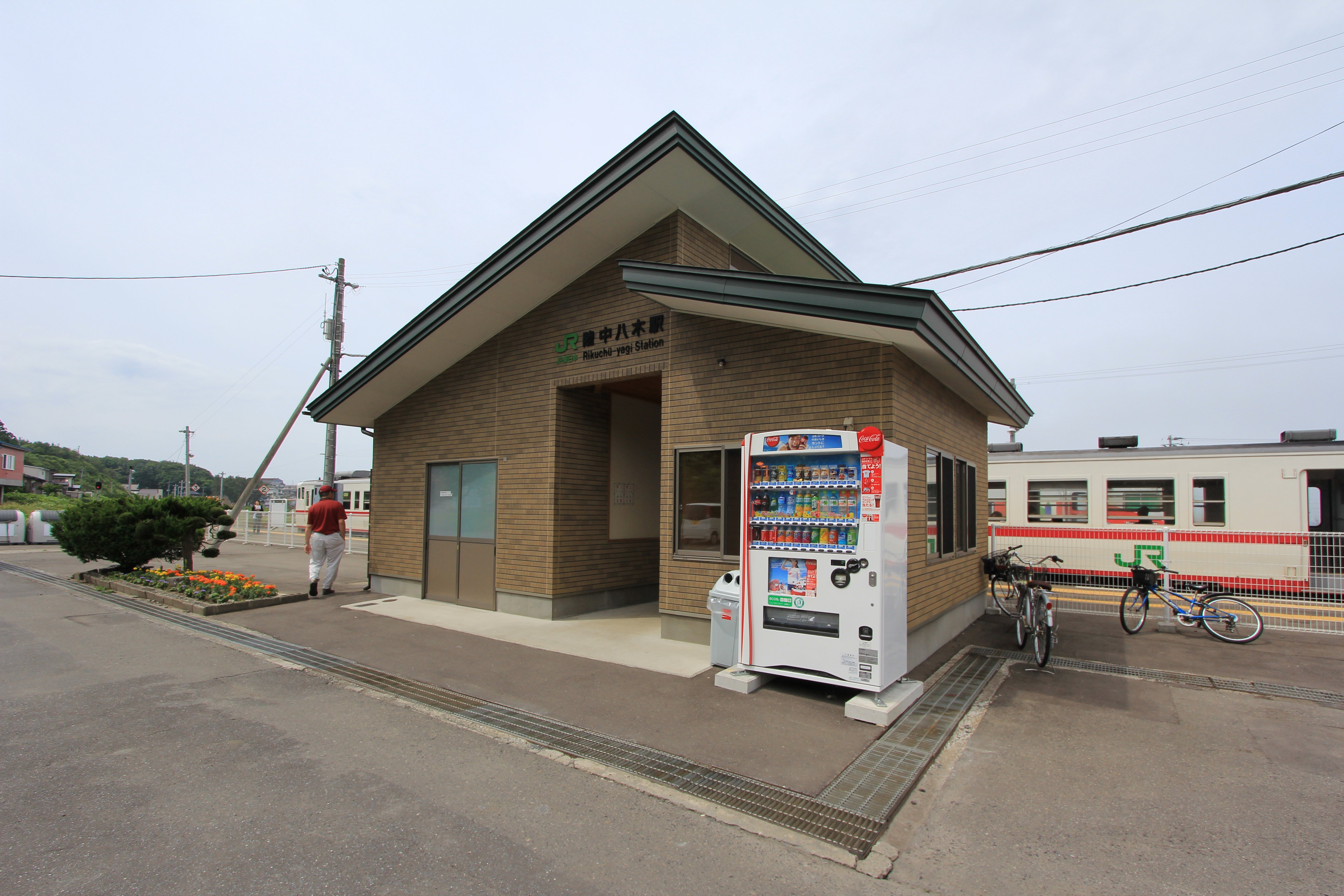 陸中八木駅